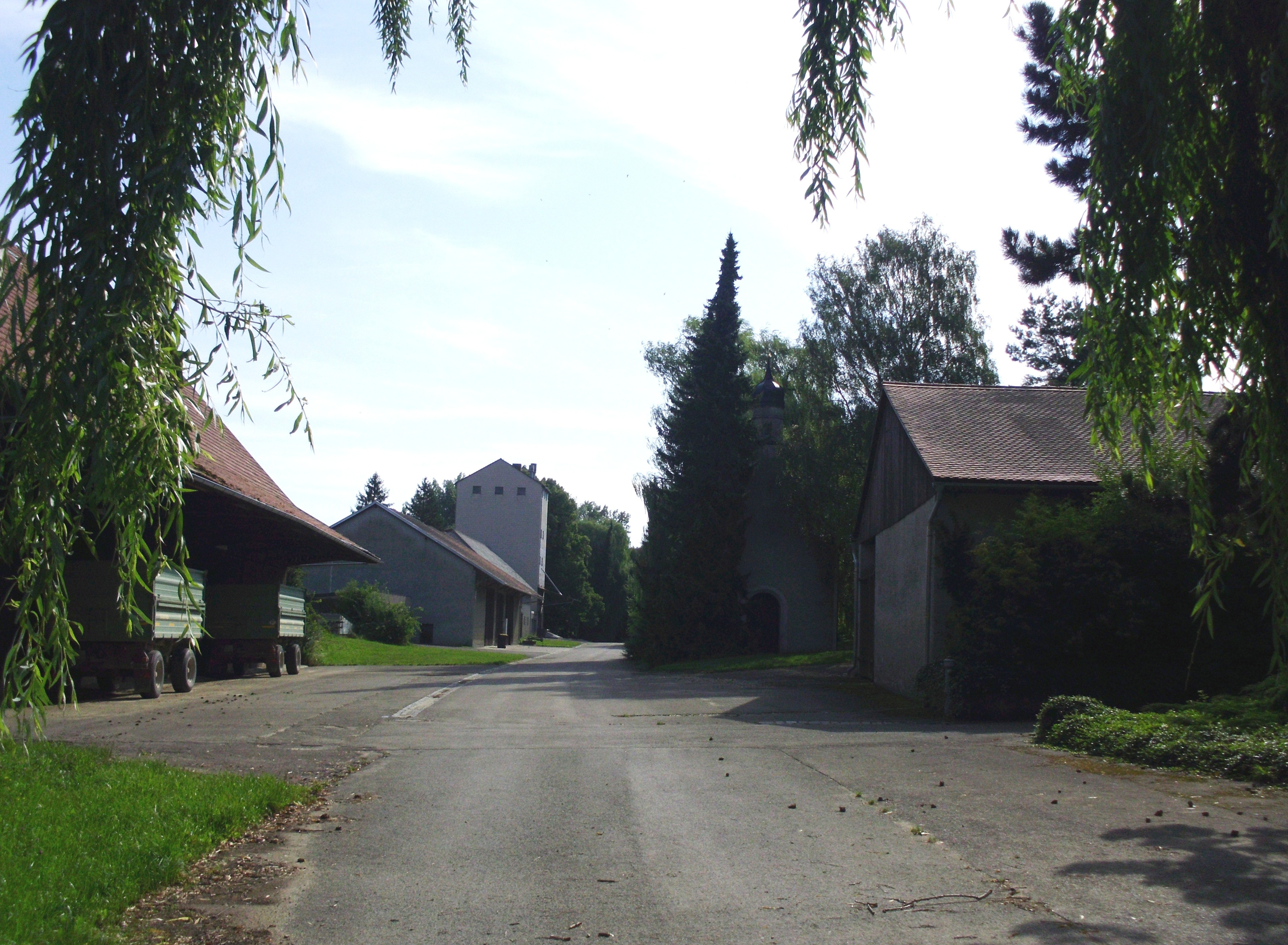 Siglohe, Ortsteil von Rennertshofen im Landkreis Neuburg-Schrobenhausen